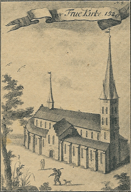 Stik der viser Vor Frue Kirke i København i 1520